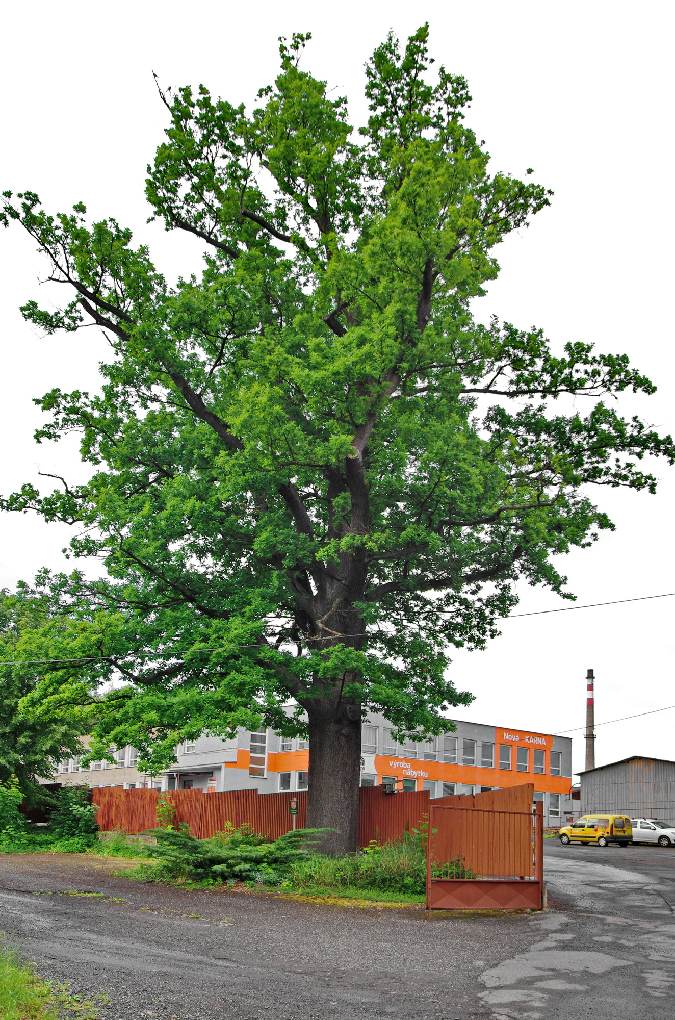 Památný strom - Dub u Hamrnického zámečku, Hamrníky, okres Cheb